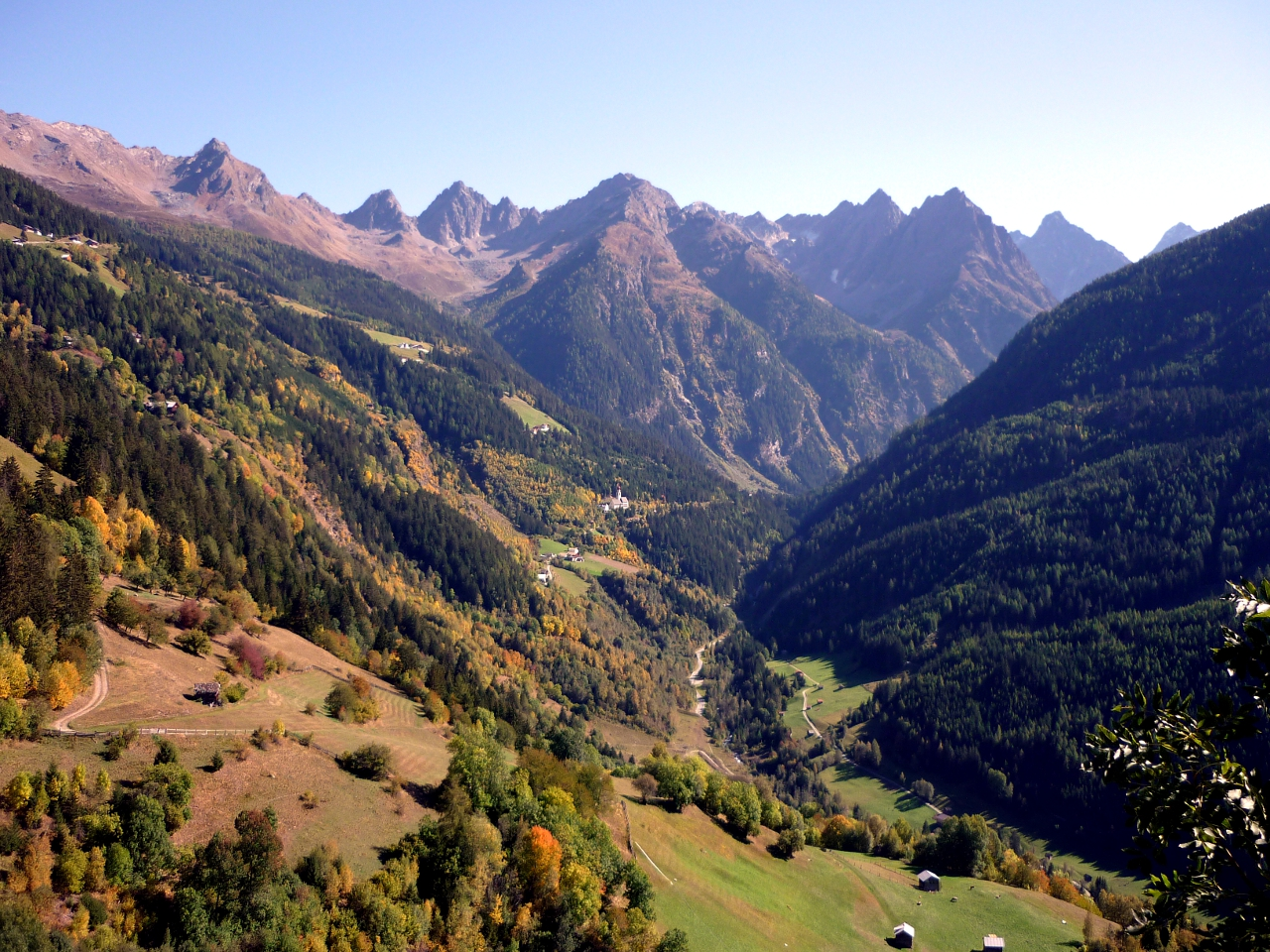 Blick vom Kaunerberg auf den Kaunergrat, Ötztaler Alpen. Im Bildzentrum sieht man die Wallfahrtskirche von Kaltenbrunn.